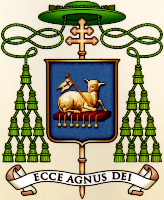 El escudo Arzobispal de don Alfonso Cortés Contreras presenta las borlas en cuatro filas y el capelo de color verde, la doble cruz; insignias por medio de las cuales se puede deducir que su nombramiento es como arzobispo, el cuadro azul contiene al Cordero de Dios que quita el pecado del mundo y su lema Ecce Agnus Dei que significa He aquí el Cordero de Dios.